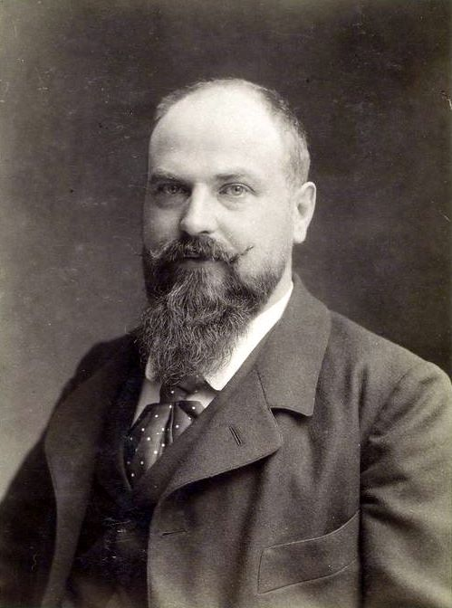 Alfred-Léon Gérault-Richard